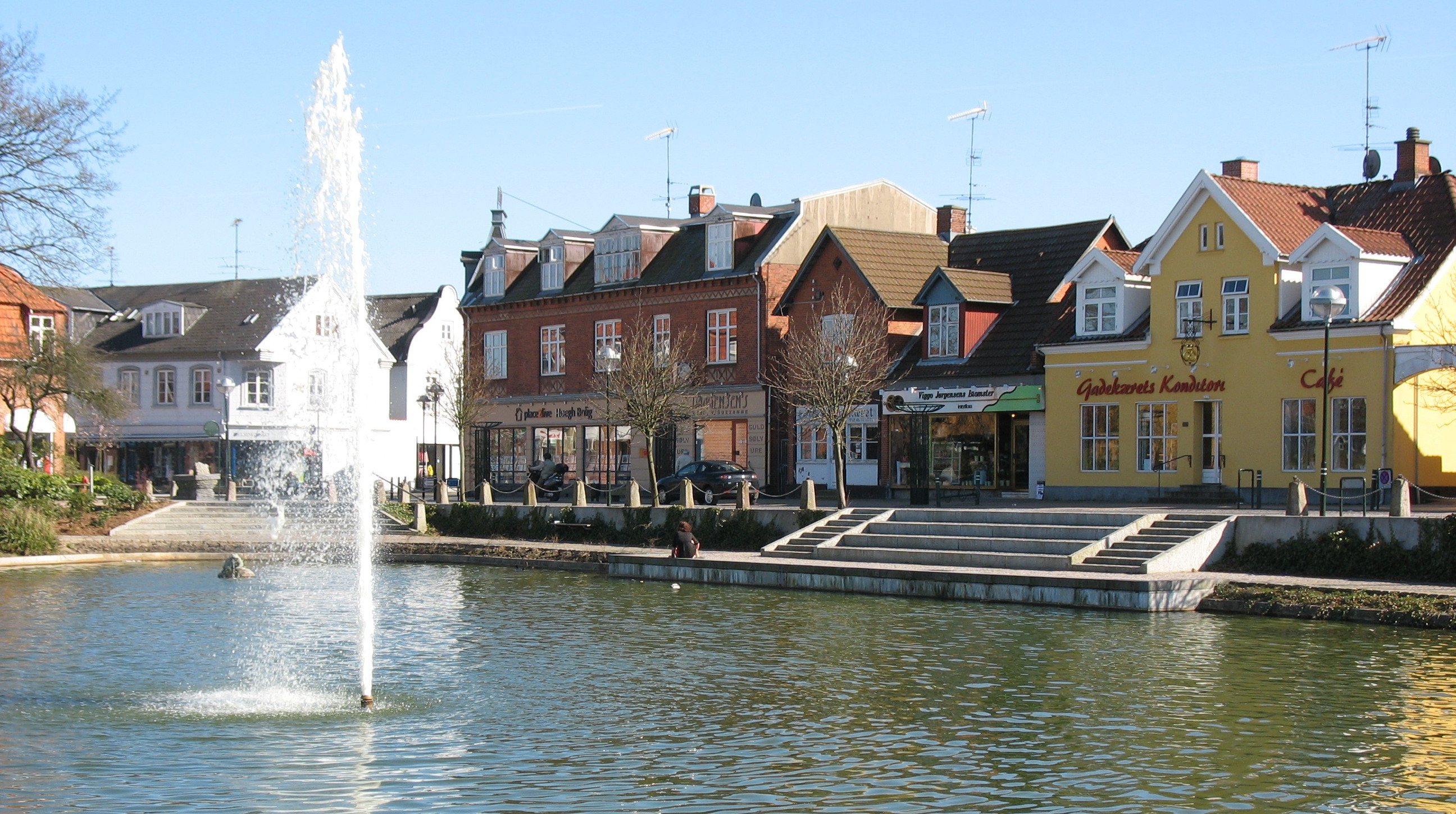 Gadekæret i Helsinge